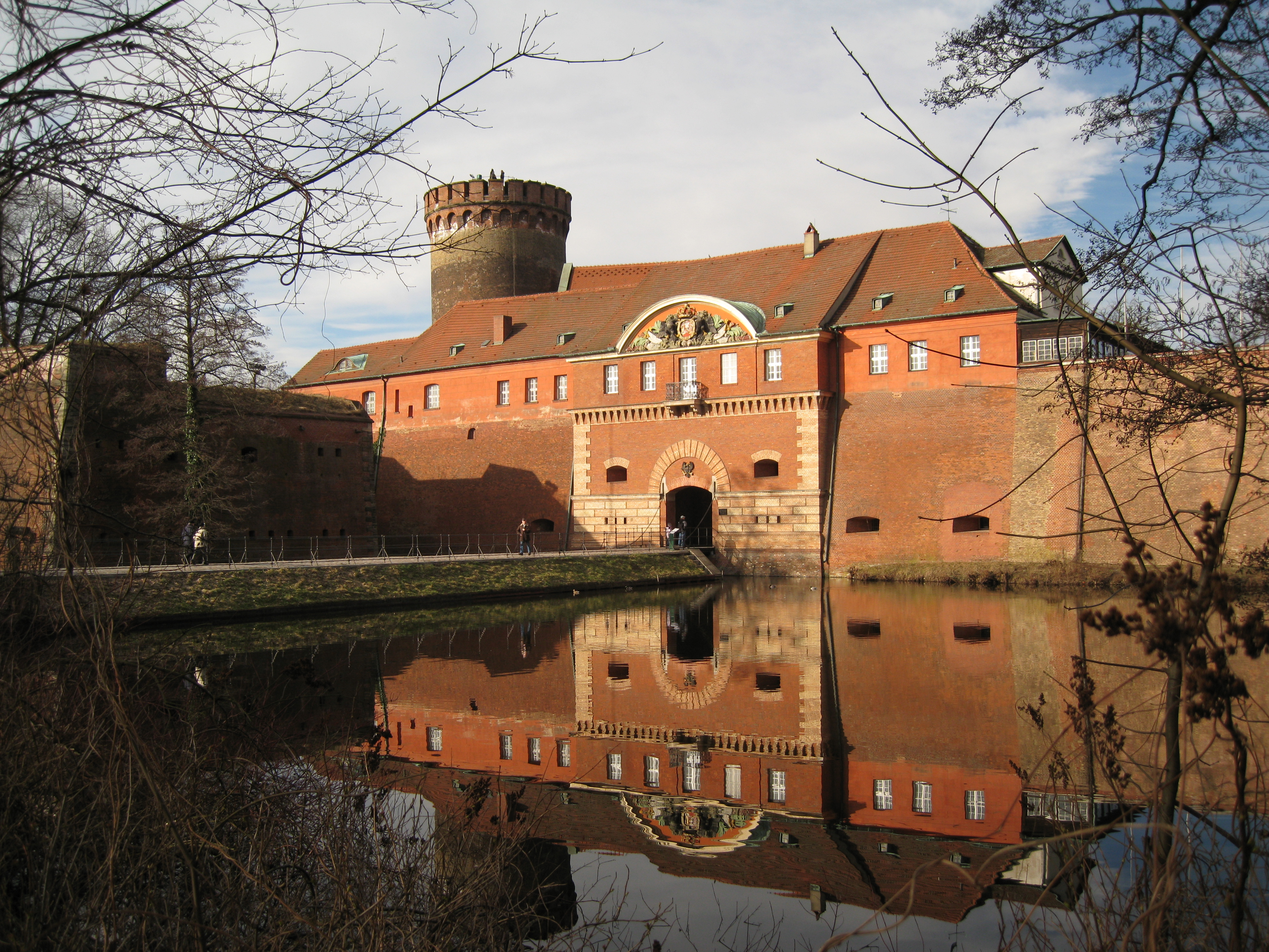 Blick auf den Haupteingang an der Südseite der Zitadelle Spandau